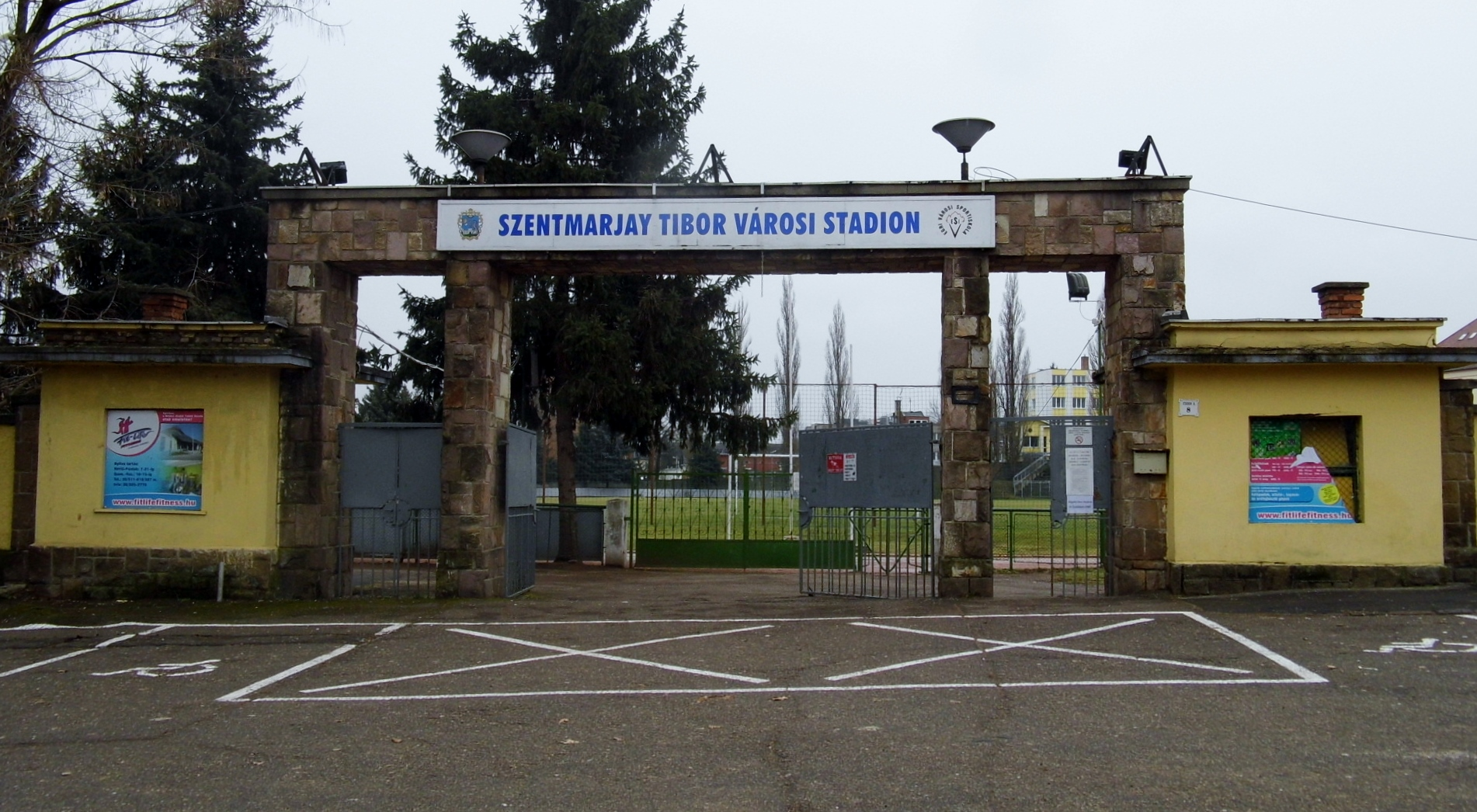 Szentmarjay Tibor Stadion, Eger